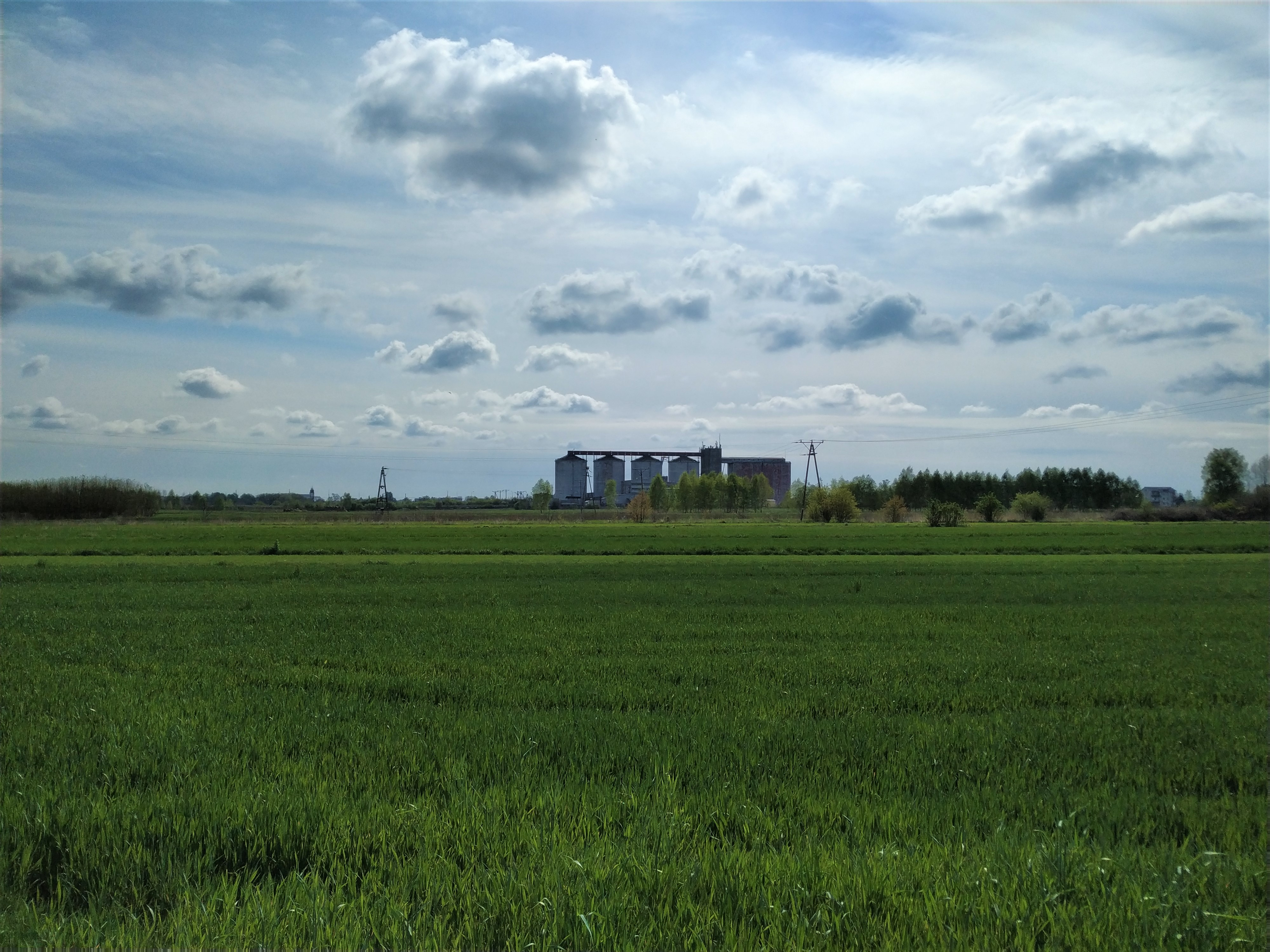 Krajobraz łąk i pól w granicach miasta Łuków, budowla w oddali to elewatory przy ul. Zbożowej